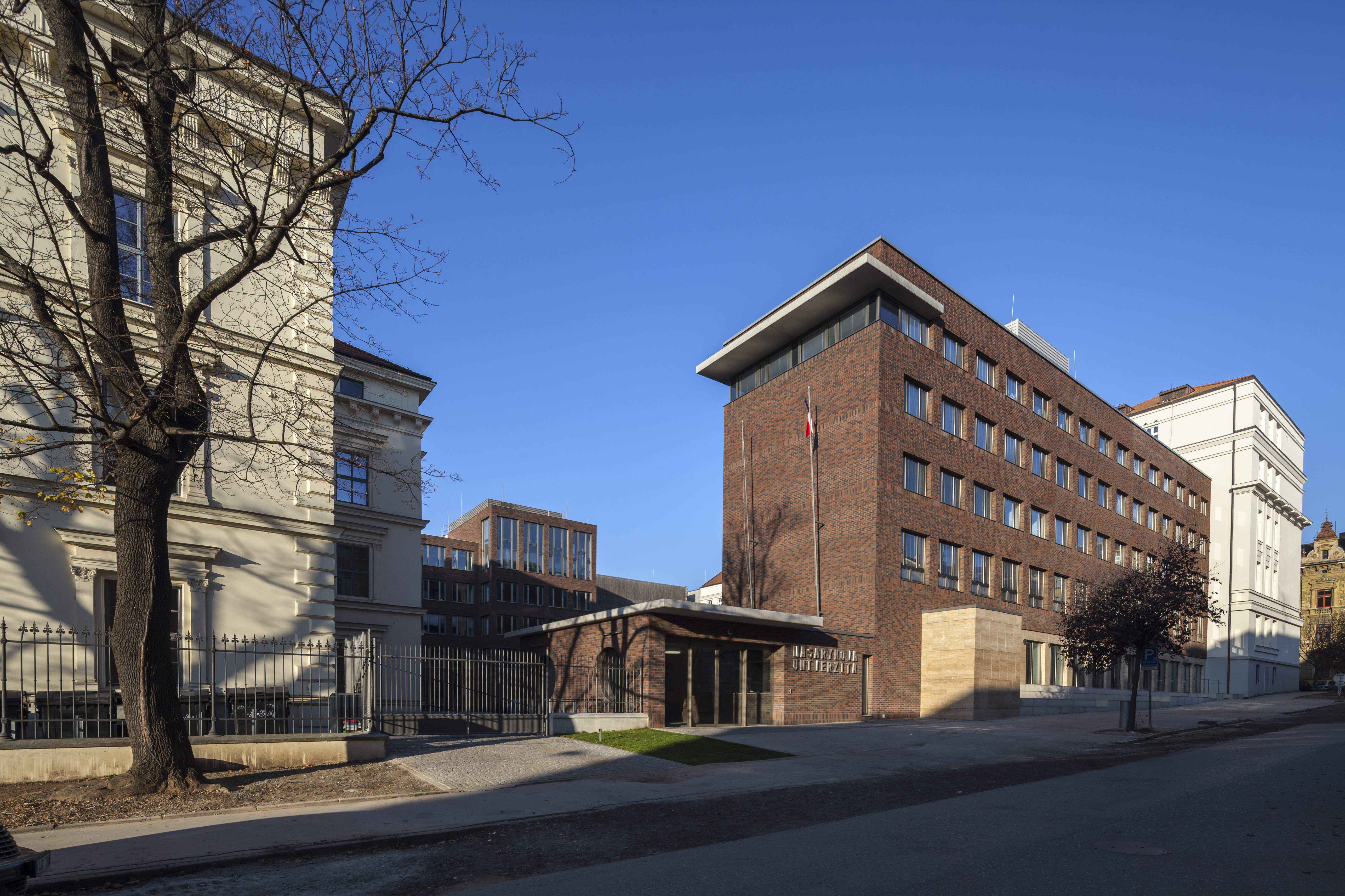 Průčelí a hlavní vstup do areálu FF MU (foto: Aleš Ležatka)